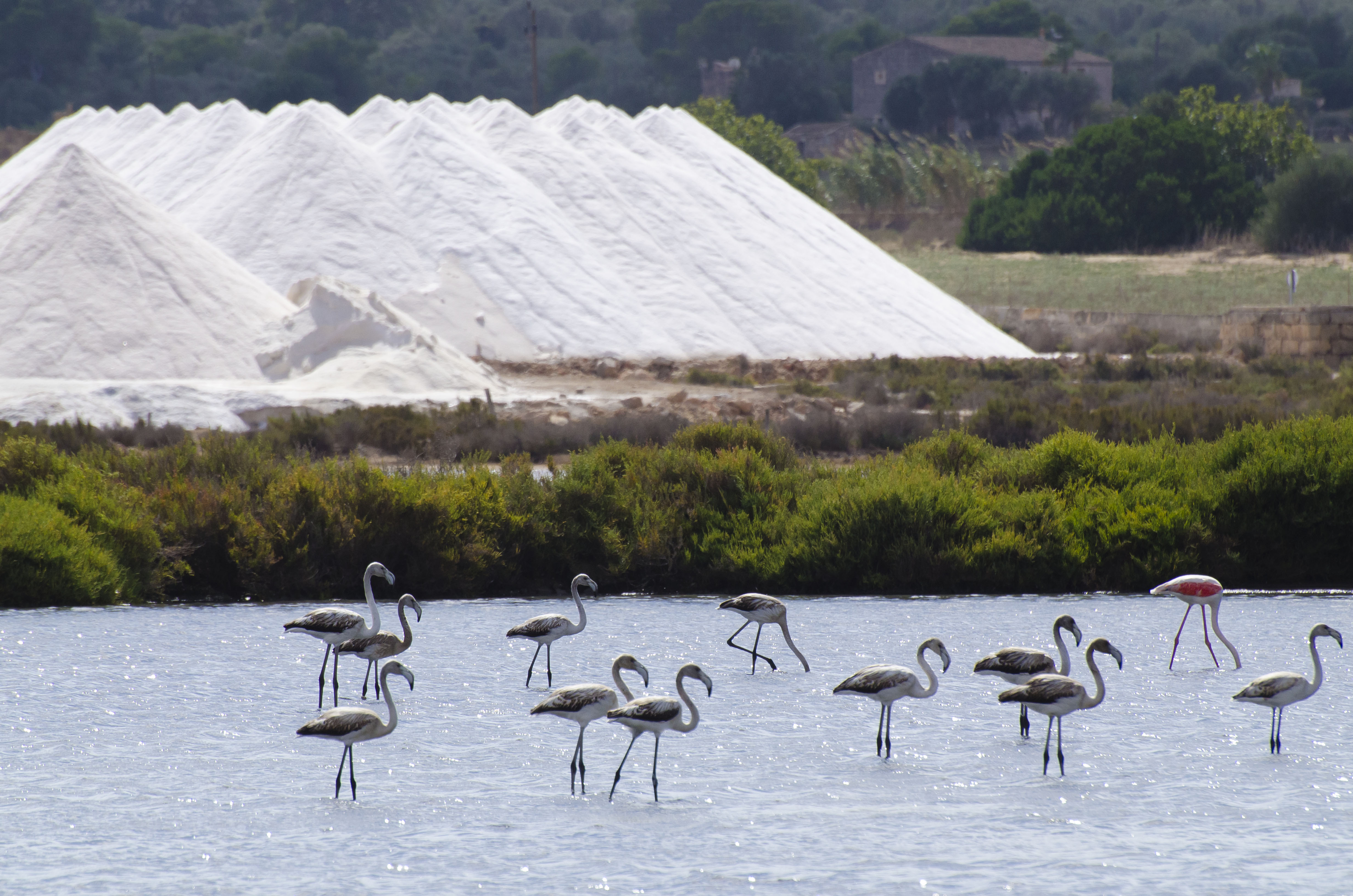 Phoenicopterus roseus, Salines d'Es Trenc, Mallorca